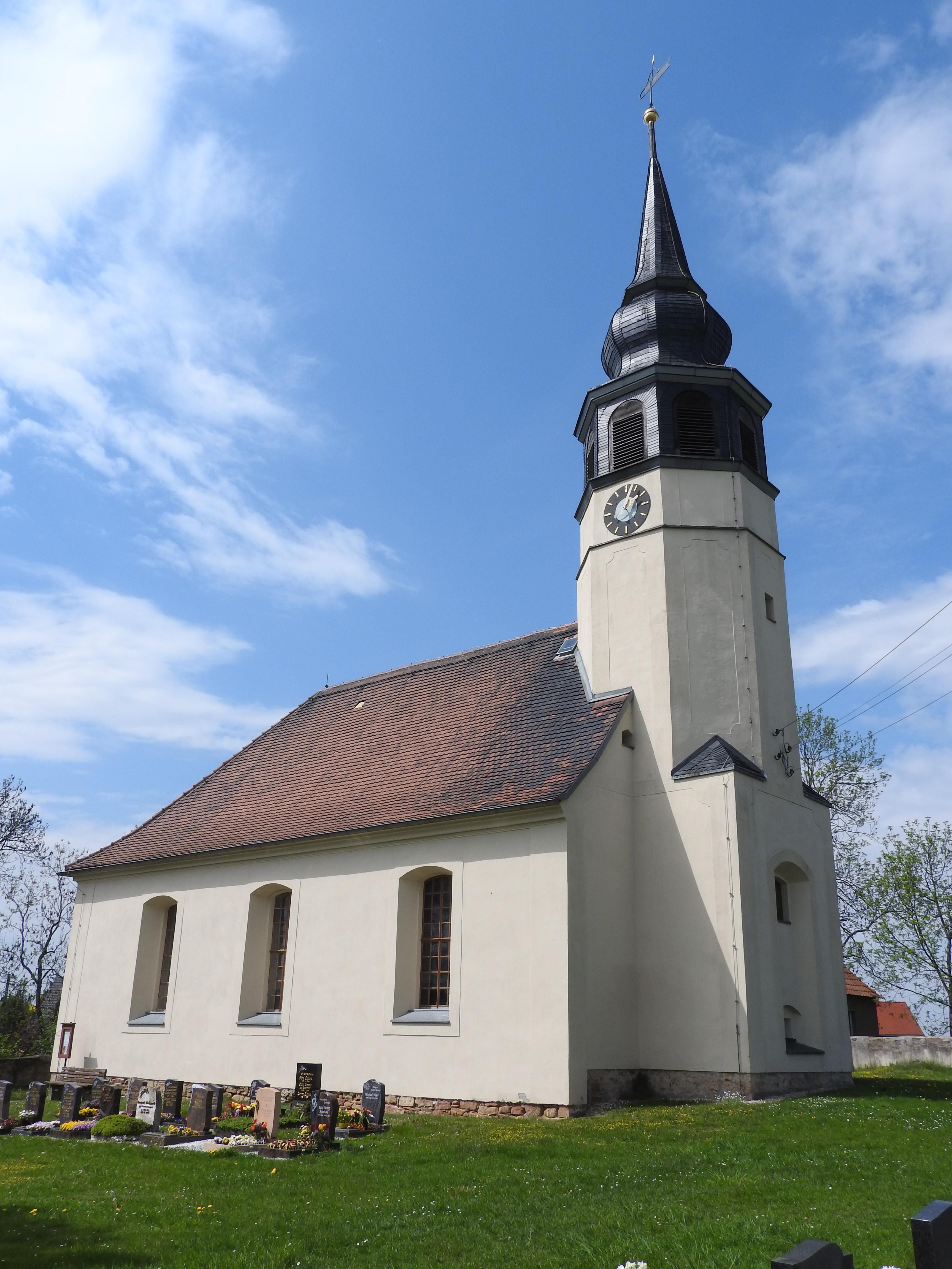 Dorfkirche Hilbersdorf, Thüringen